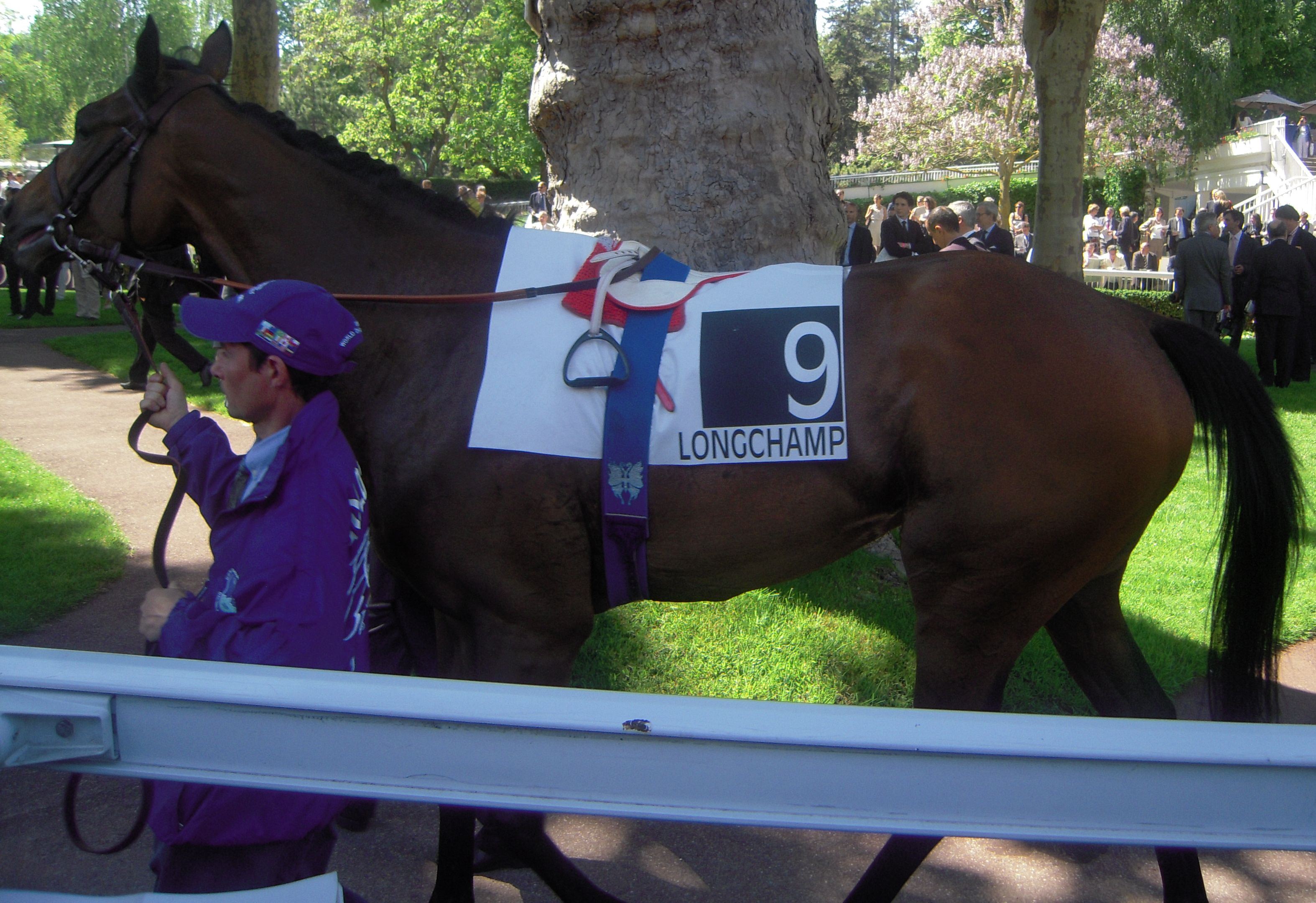 2010年イスパーン賞パドックでのゴルディコヴァ